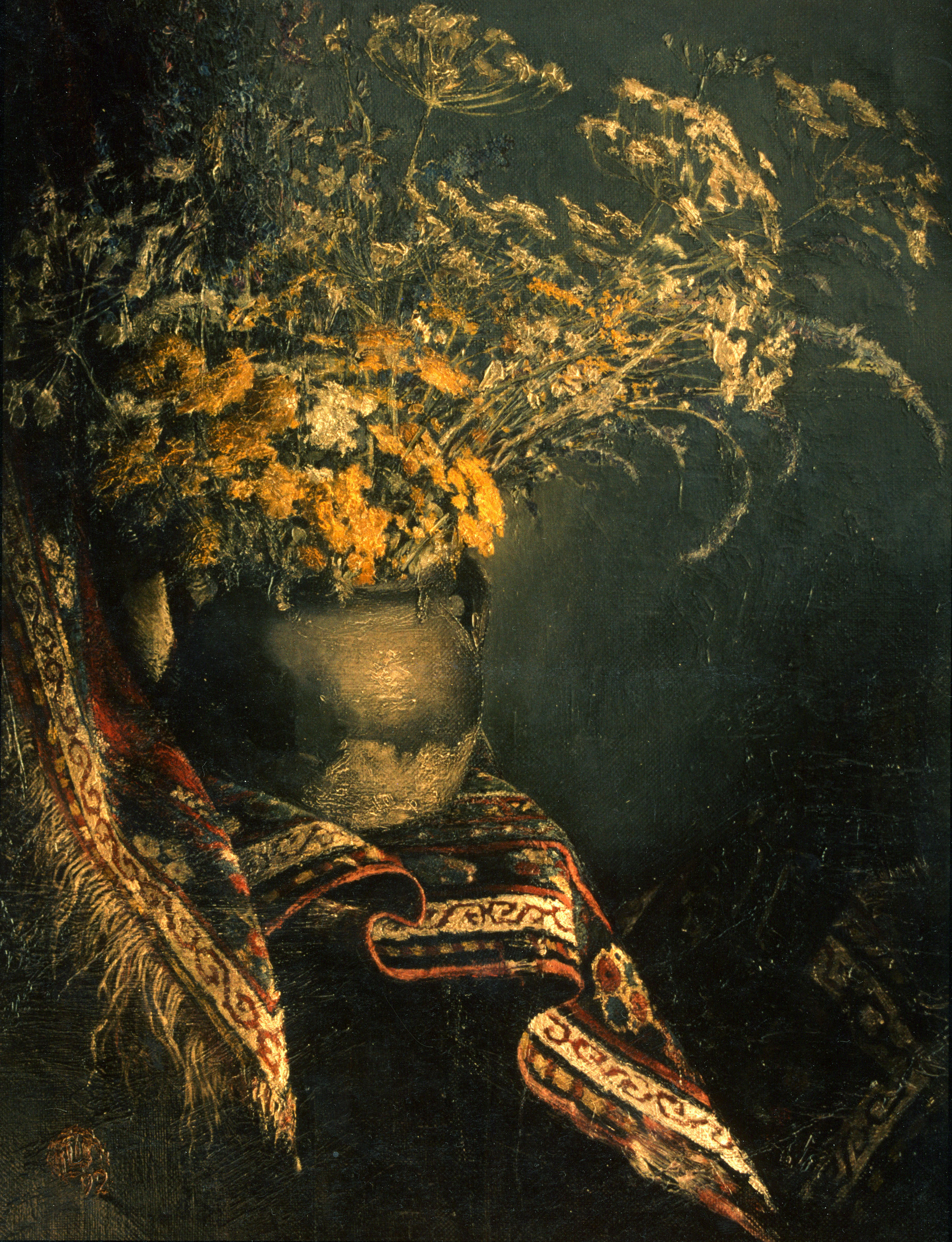 Գեղանկարիչ` Սամվել Լաճիկյան